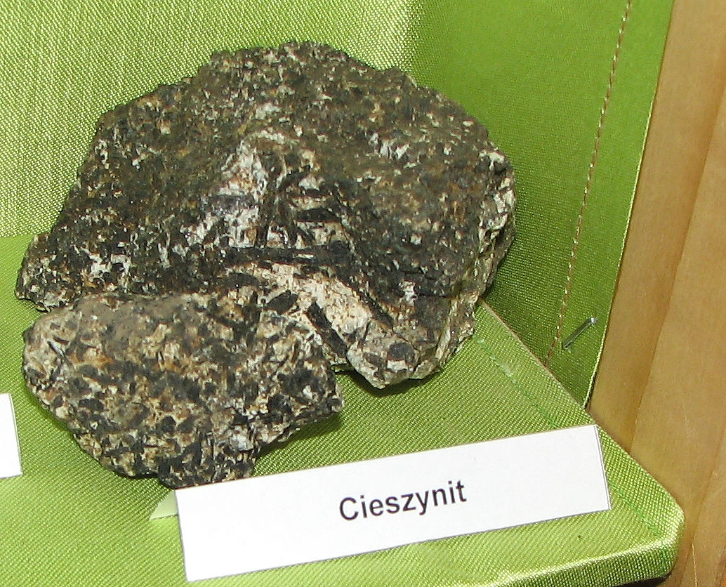 Cieszynik w Muzeum Beskidzkim w Wiśle